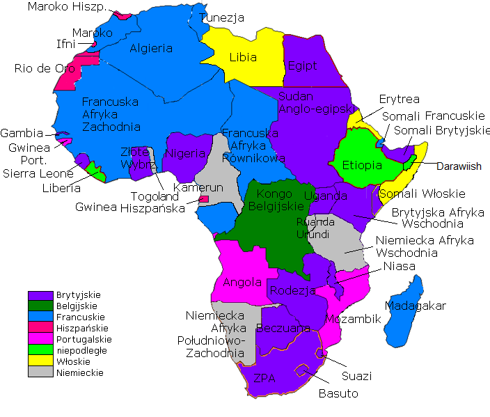 Kolonie w Afryce, 1914